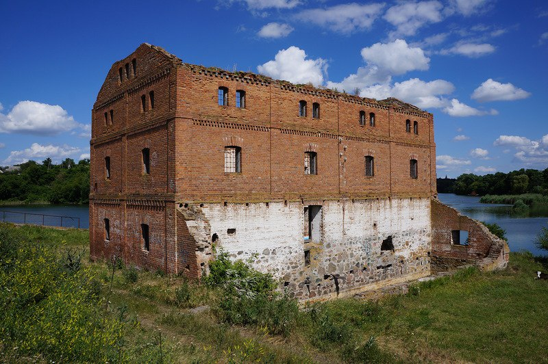 Млин "Порхун"